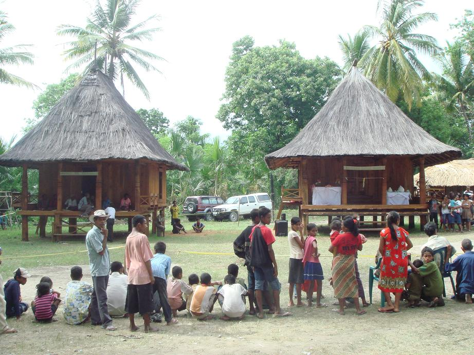 Kadunan Umberloik e Natar Bokur